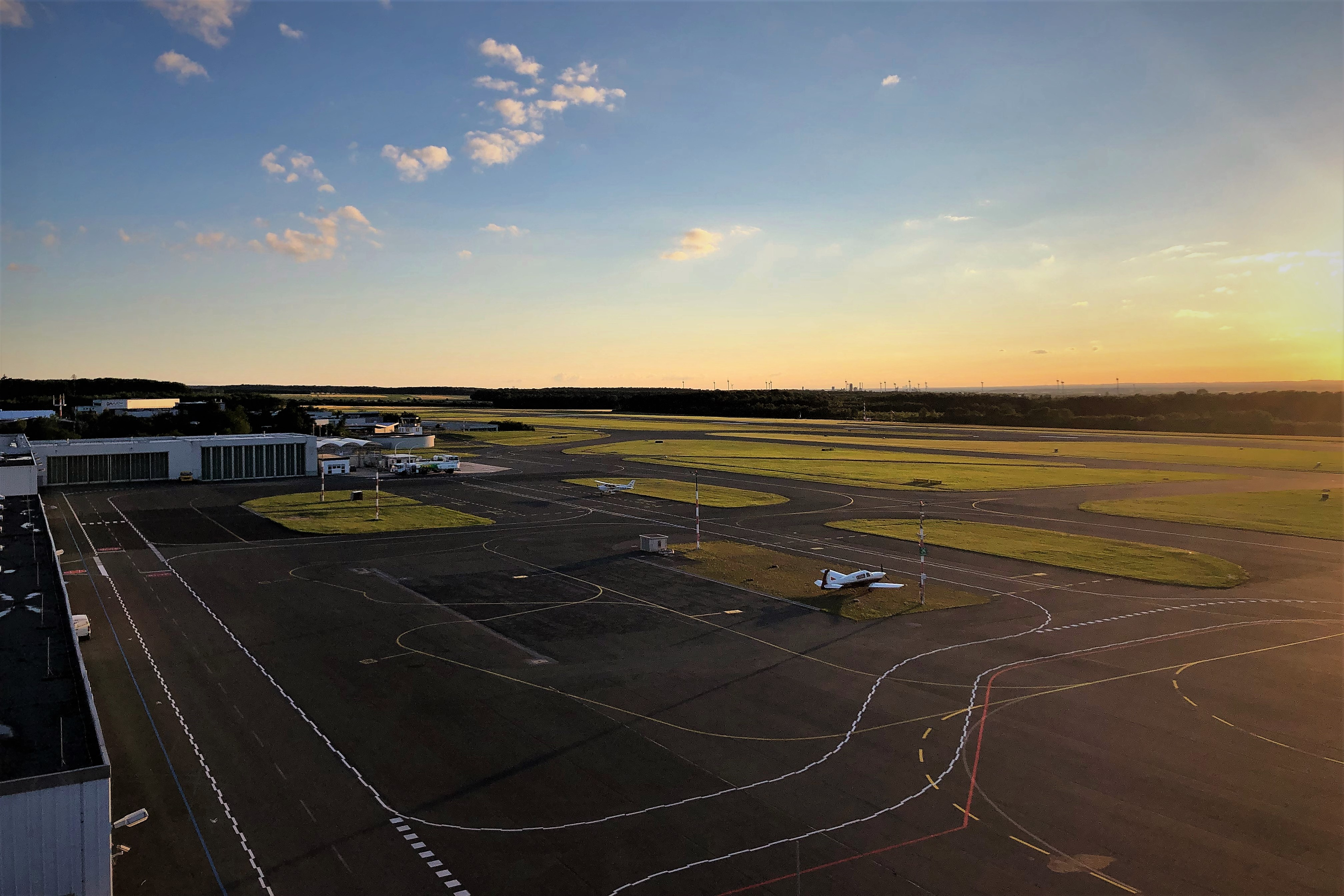 Das hintere Vorfeld des Flughafens Paderborn/Lippstadt